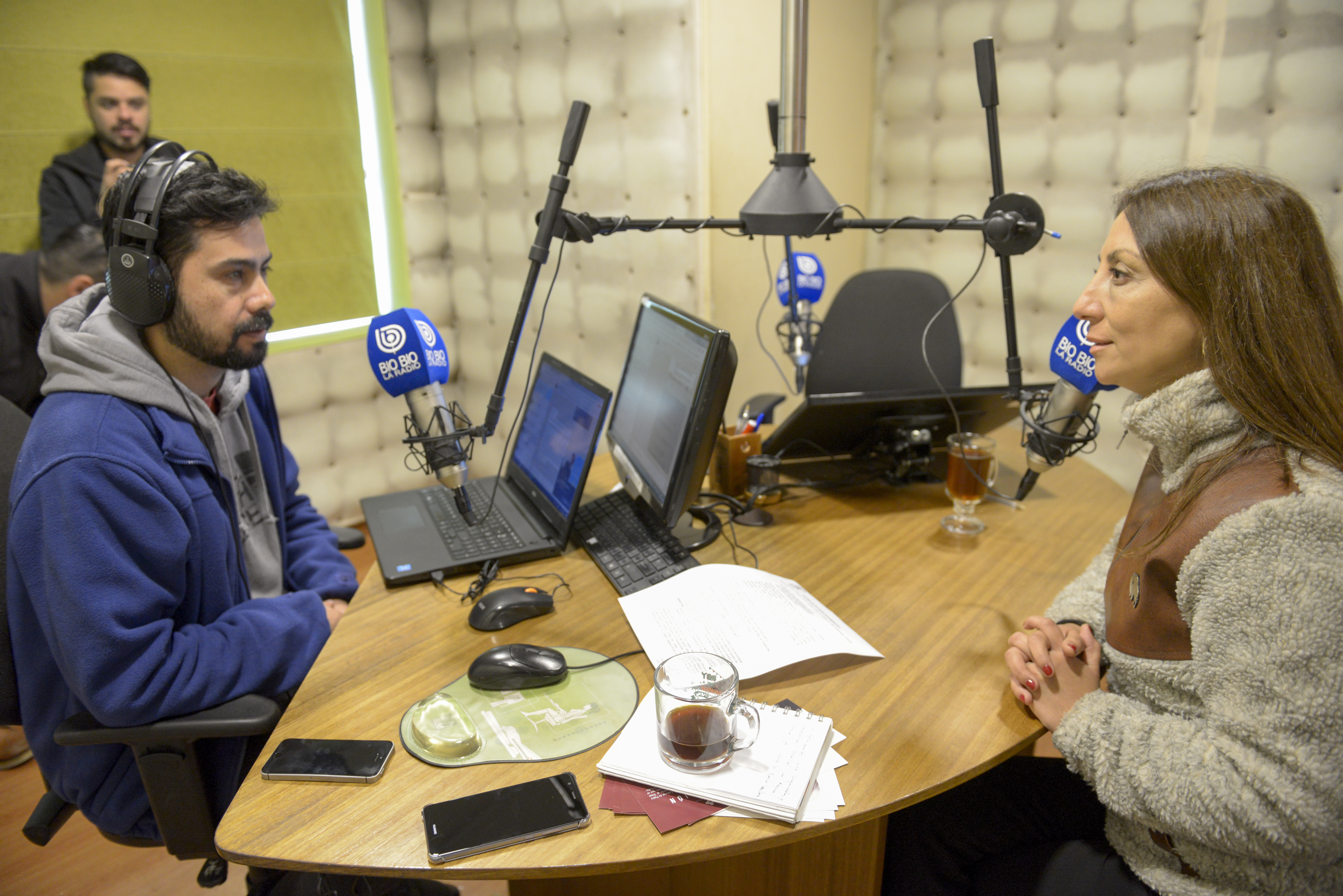 Gira Araucanía: Ministra Cecilia Pérez en entrevista para Radio Bio-Bio